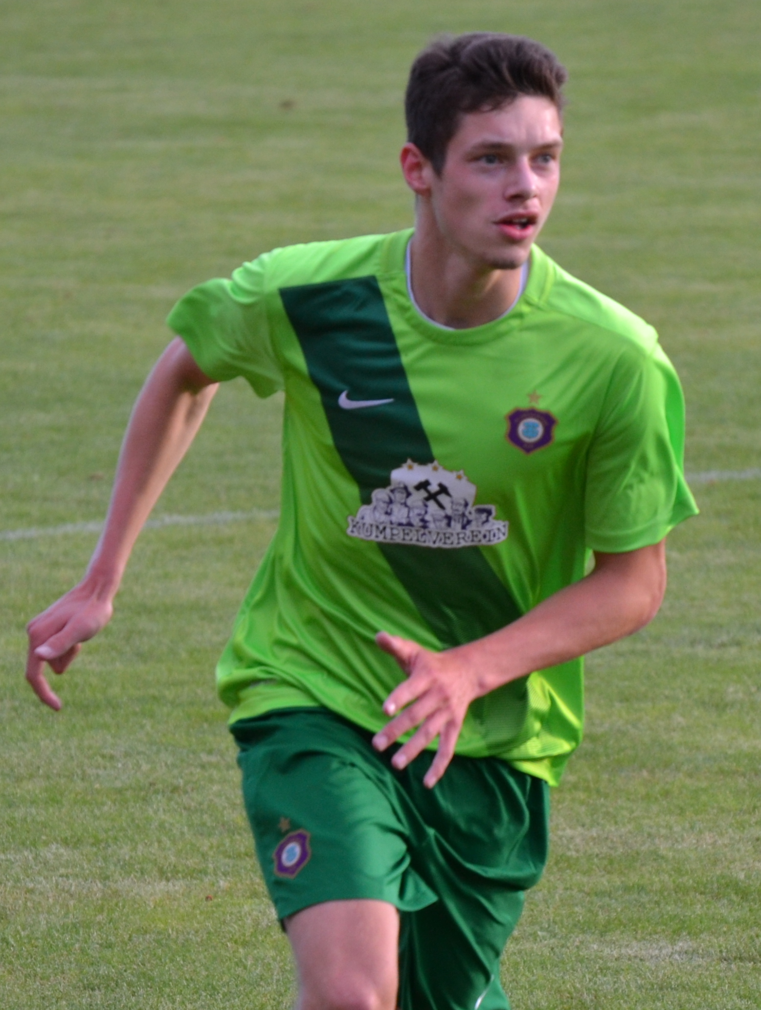 Marcin Sieber beim Freundschaftsspiel von Erzgebirge Aue beim HFC Colditz im Juni 2016